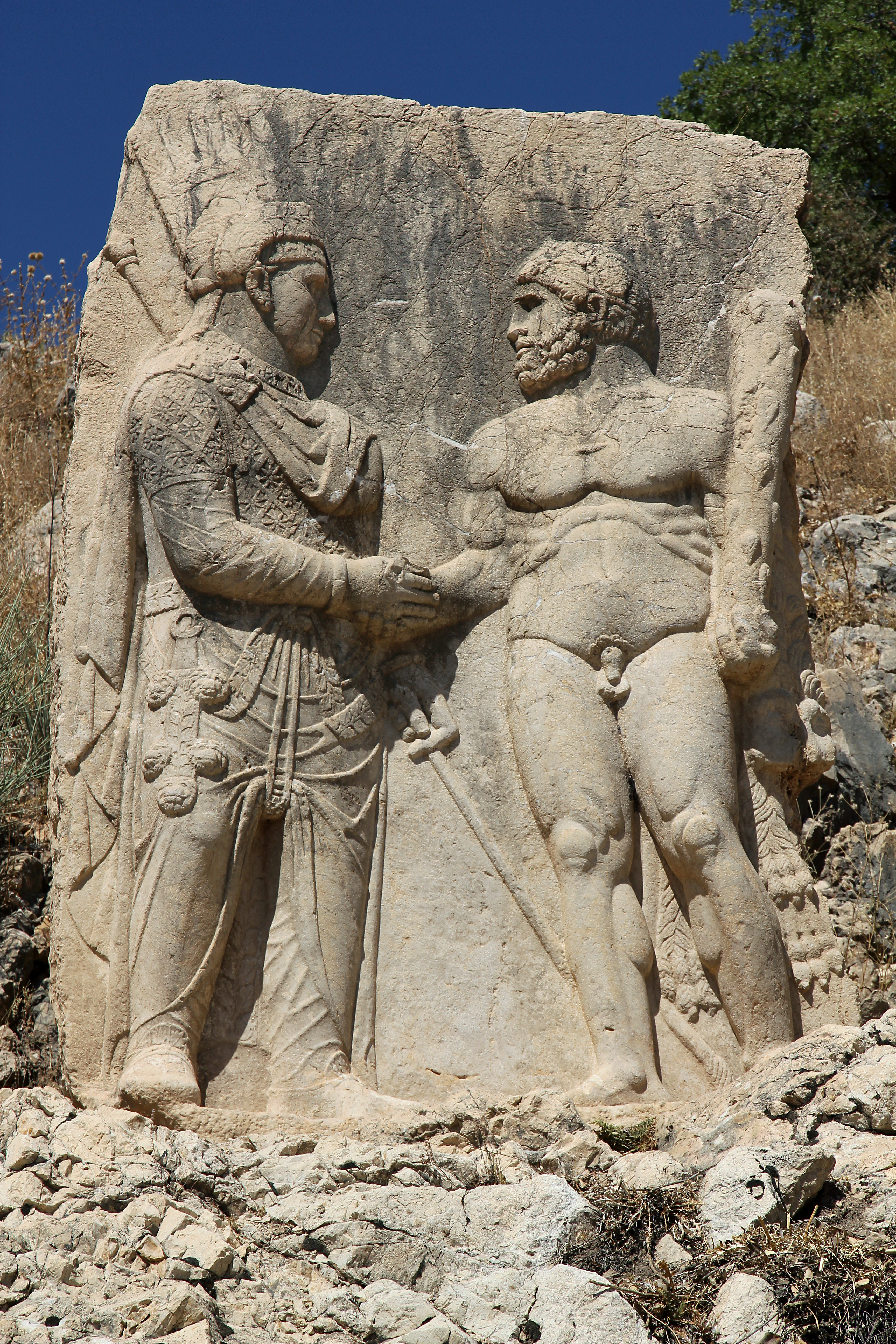 Dexiosis-Relief aus Arsameia am Nymphaios, Türkei, beim Nemrut Dag, Antiochos I. von Kommagene mit Herakles